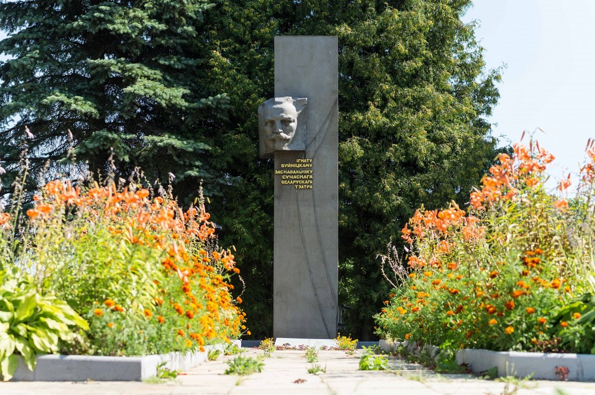 Празарокі. Помнік Ігнату Буйніцкаму